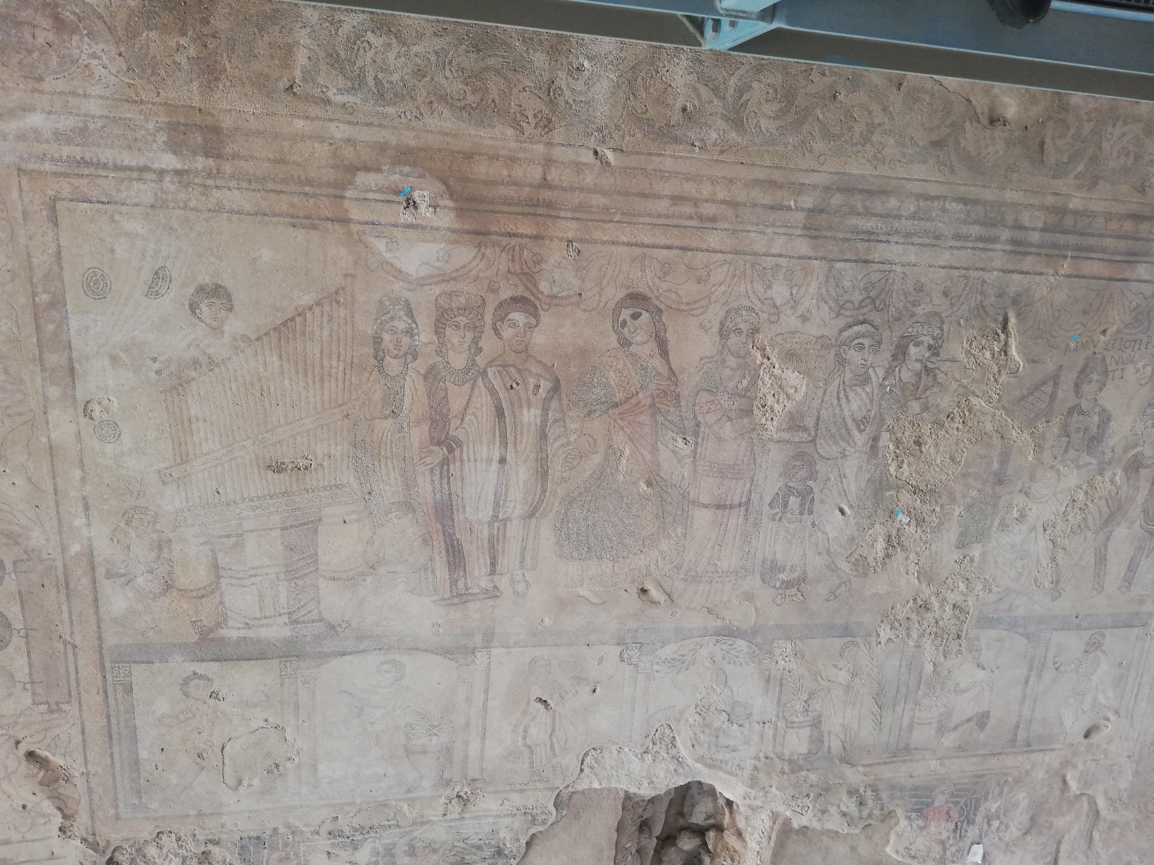 Villa erromatar honetan balio handiko mosaikoak aurkitu dira.